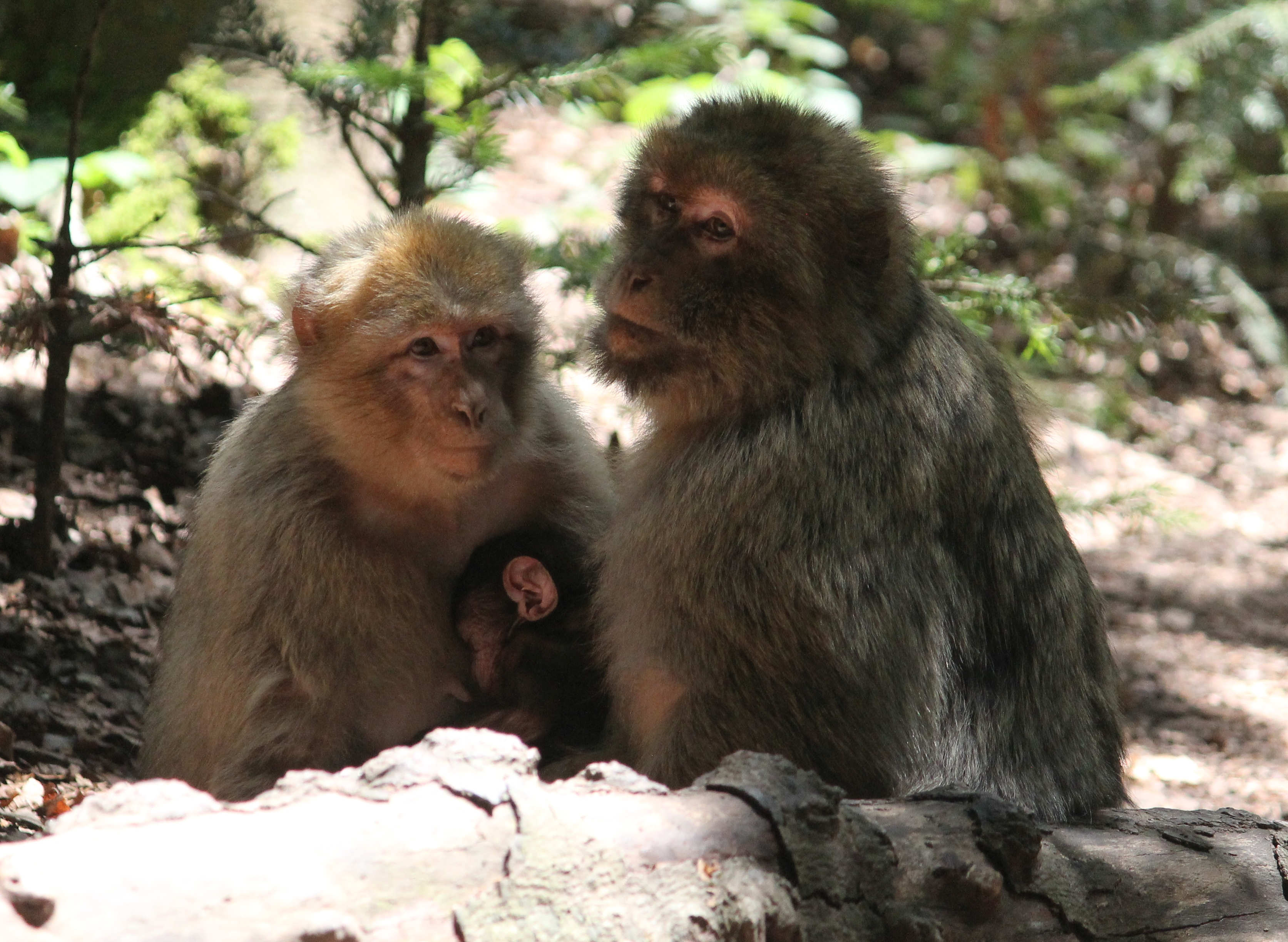 La Montagne des Singes, Kintzheim (2016)